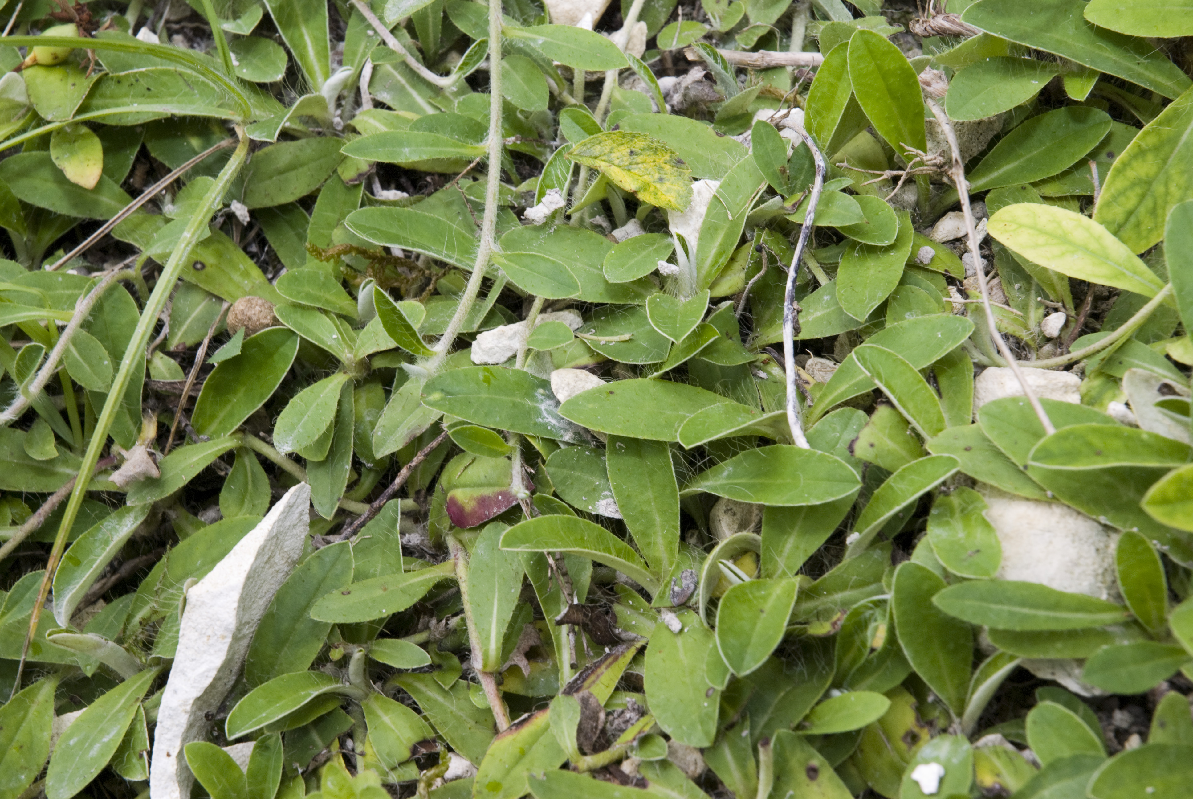 Hieracium pilosella Bray-sur-Somme (Somme), France